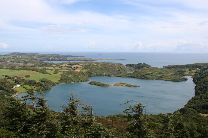 Taken on 08/07/07